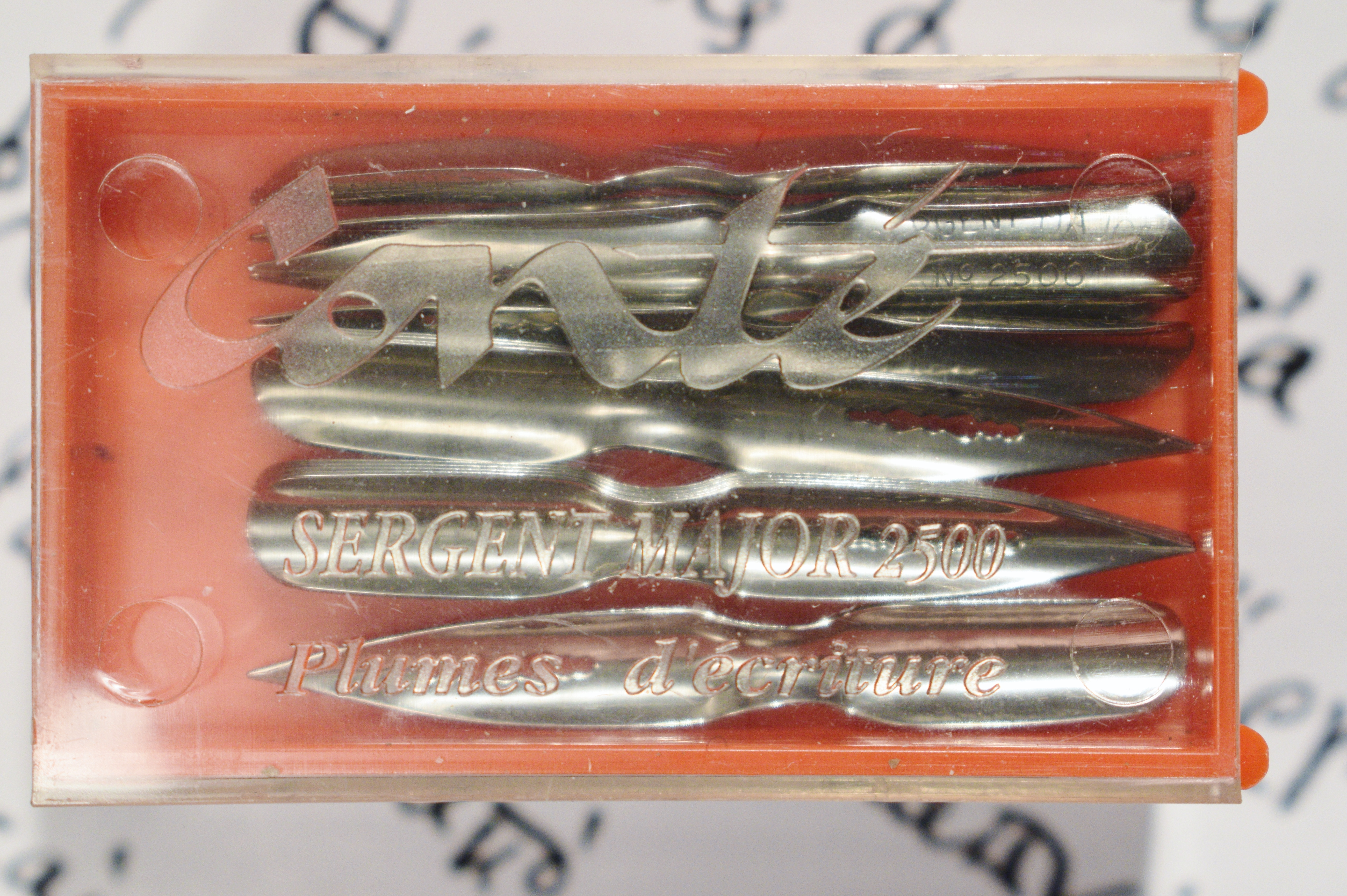 Capsa de plomes.